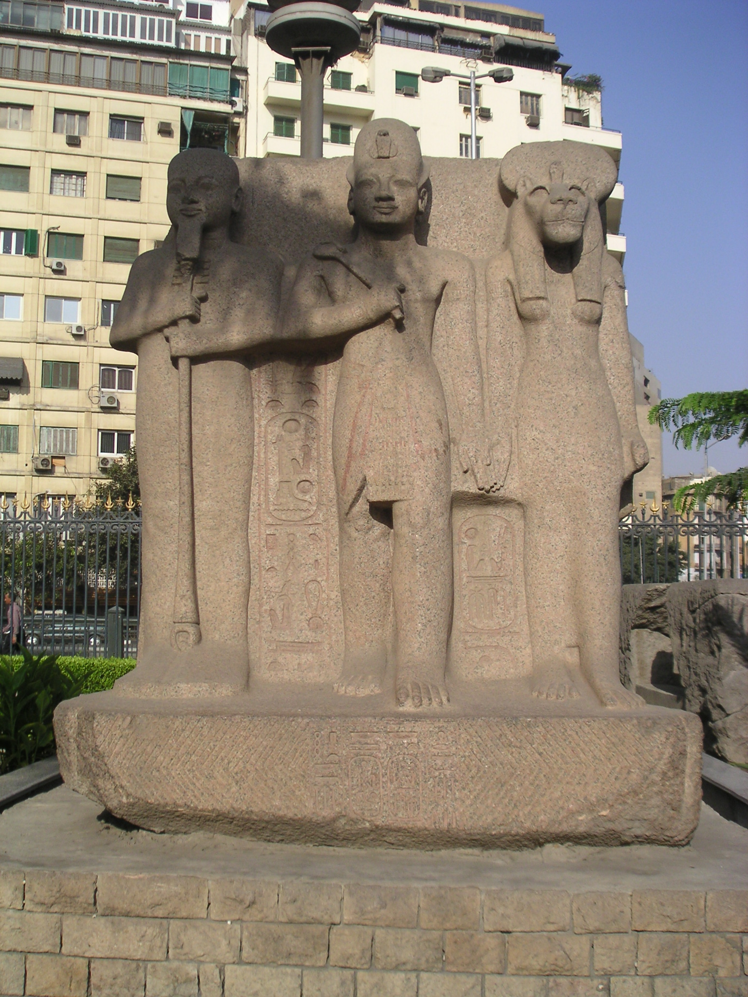 Triade colossale de Ramsès II encadré par Ptah et Sekhmet trouvée à Memphis - XIXe dynastie - Musée du Caire user:Neithsabes